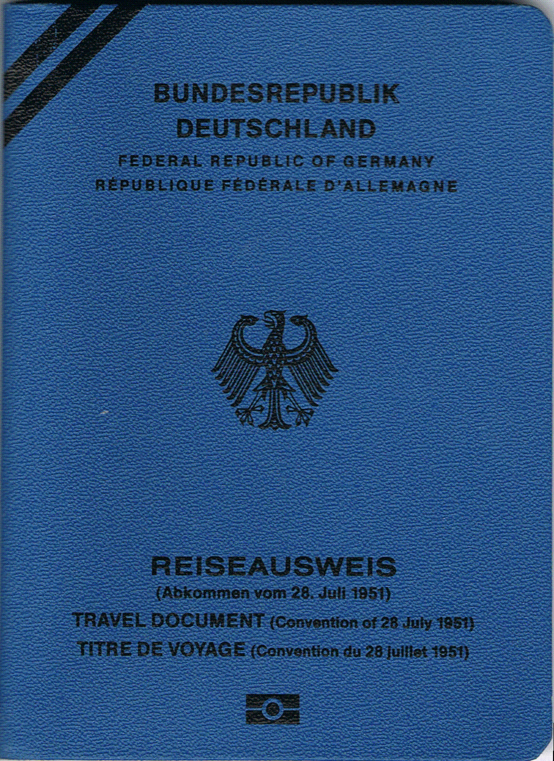 Reisepass für Flüchtlinge der Bundesrepublik Deutschland vom September 2008